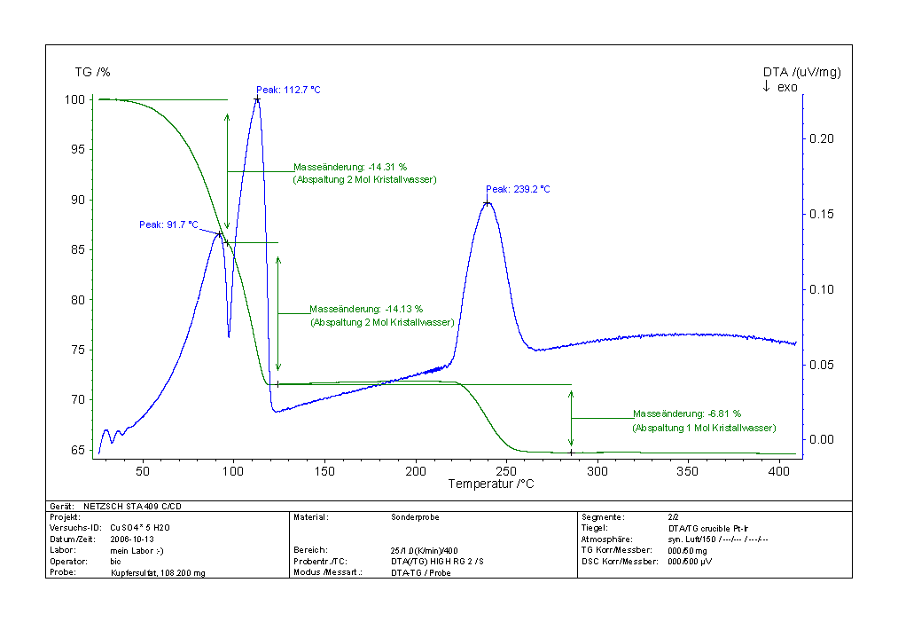 Abspaltung von Kristallwasser bei CuSO4 · 5 H2O in der DTA